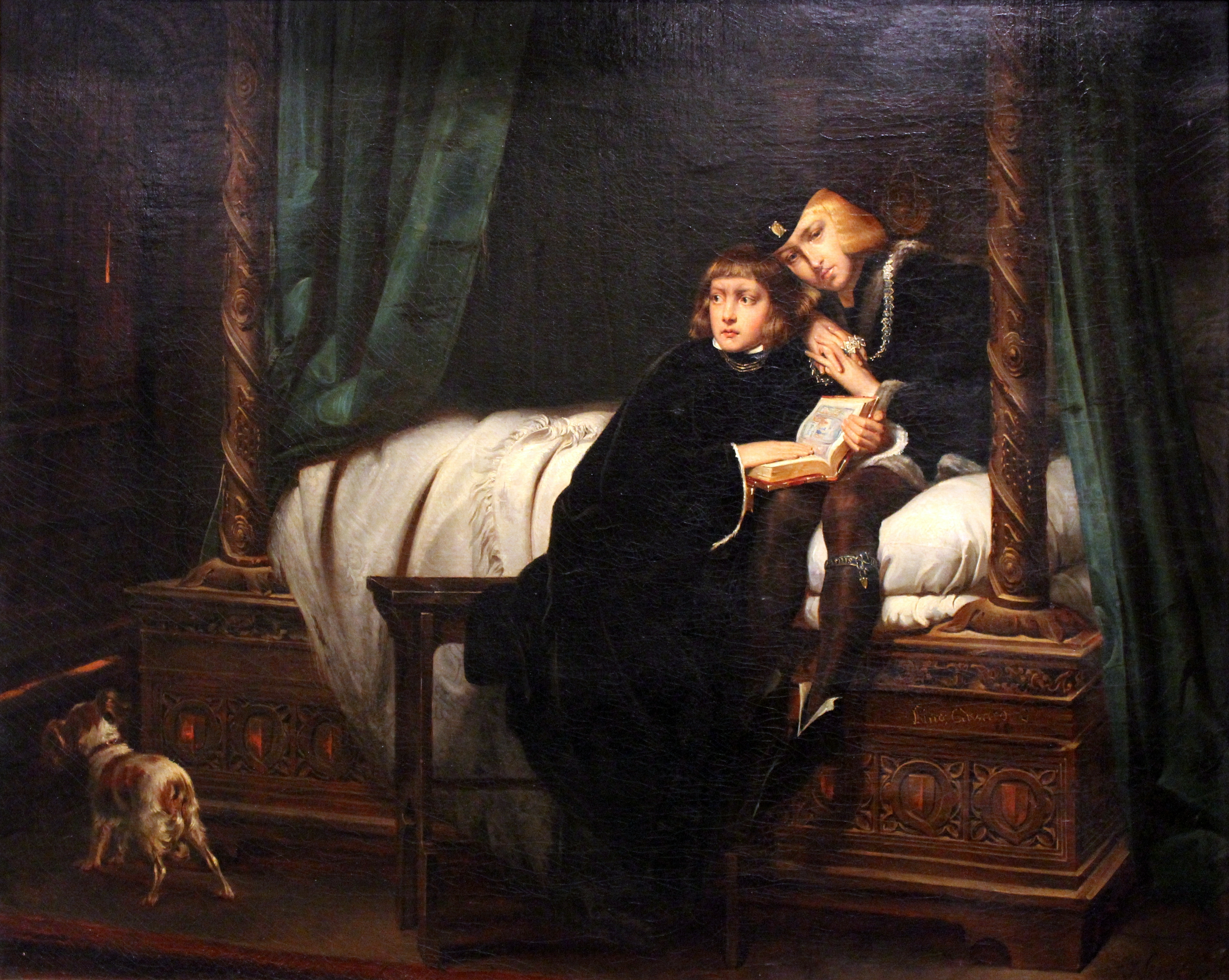 Les Enfants d'Édouard, peint par Paul Delaroche en 1830, exposé au Musée des beaux arts de Lyon en 2014